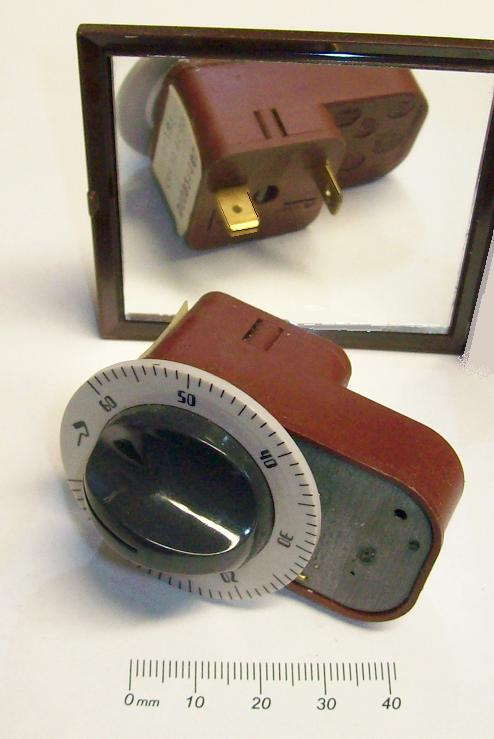 Kurzzeitschaltuhr / short time switching clock